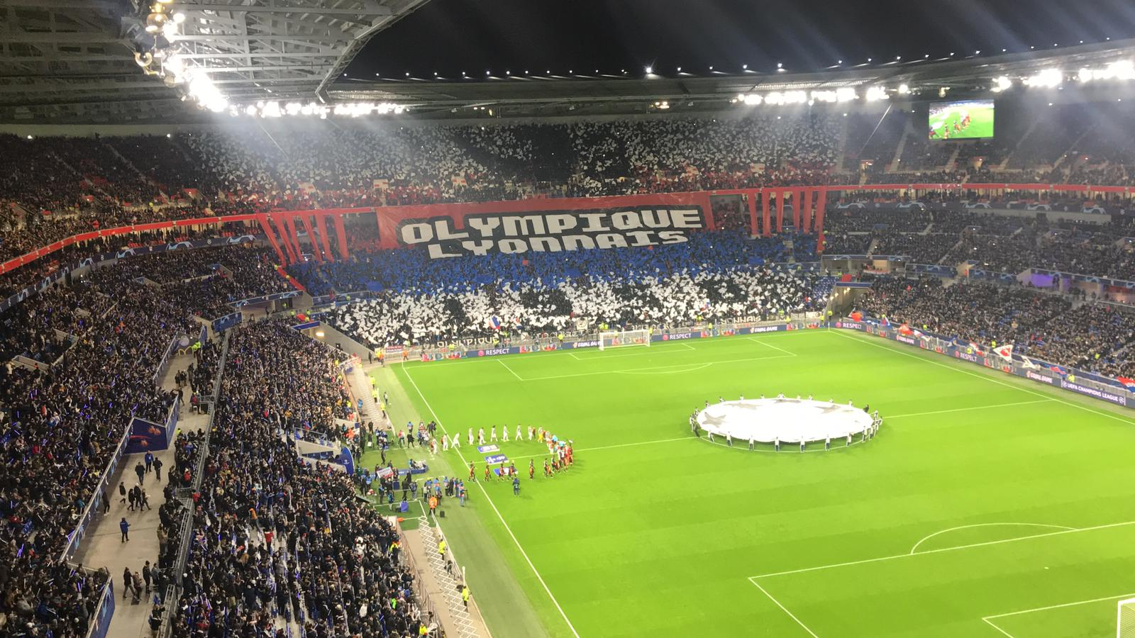 OL-Leipzig Groupama Stadium